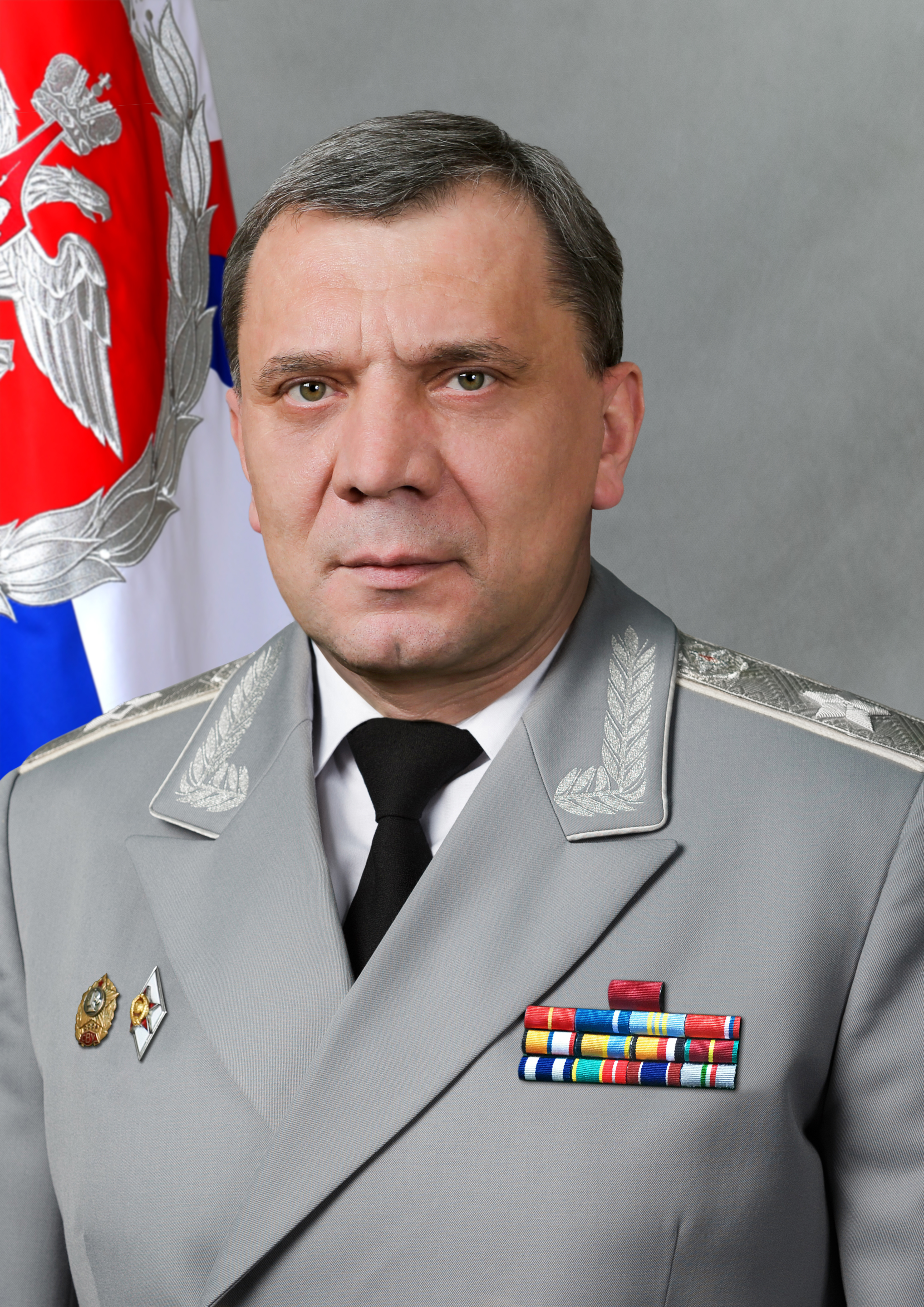 Заместитель Министра обороны Российской Федерации Борисов Юрий Иванович